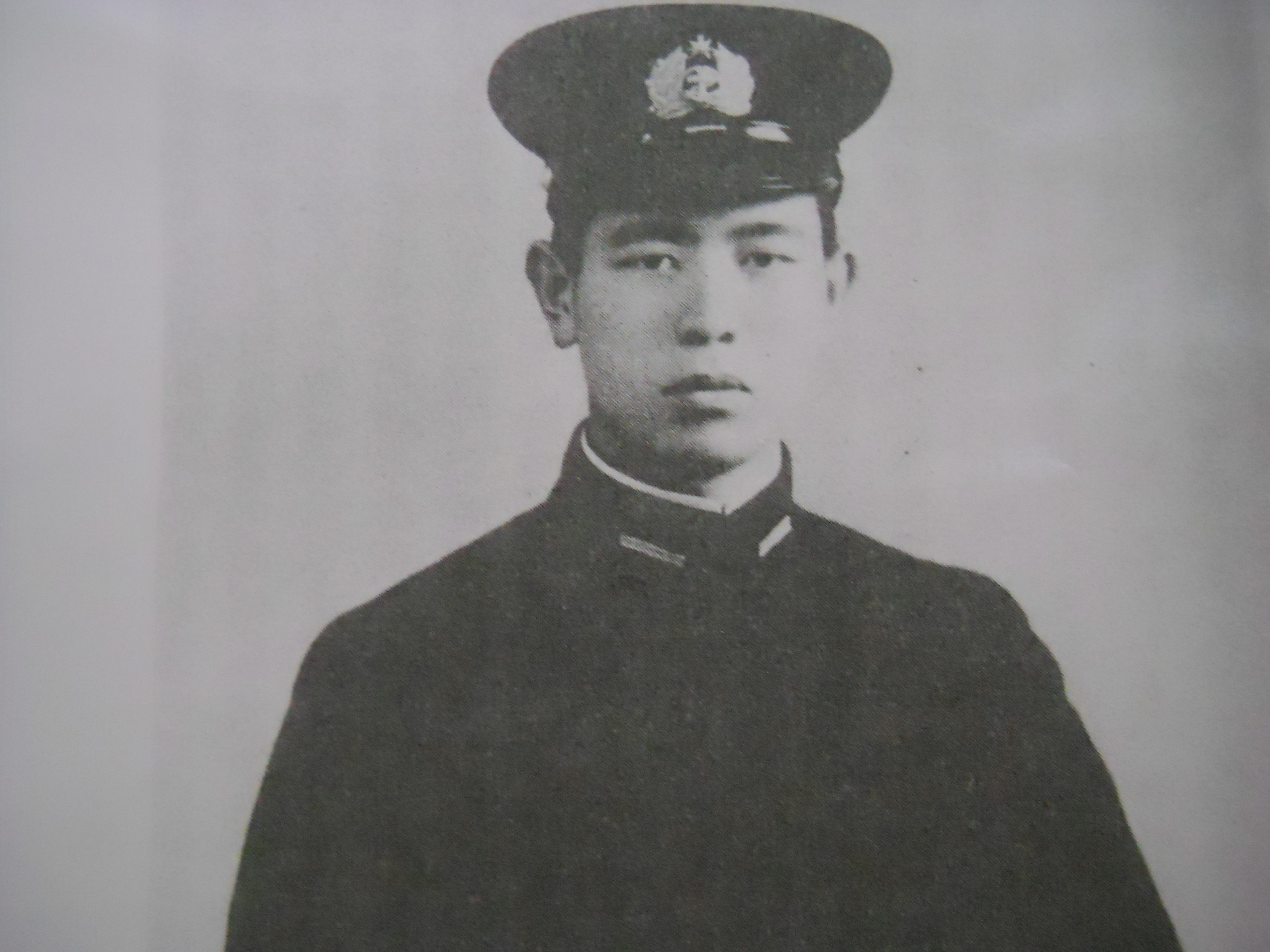 Ａｇａｗａ Ｈｉｒｏｙｕｋｉ